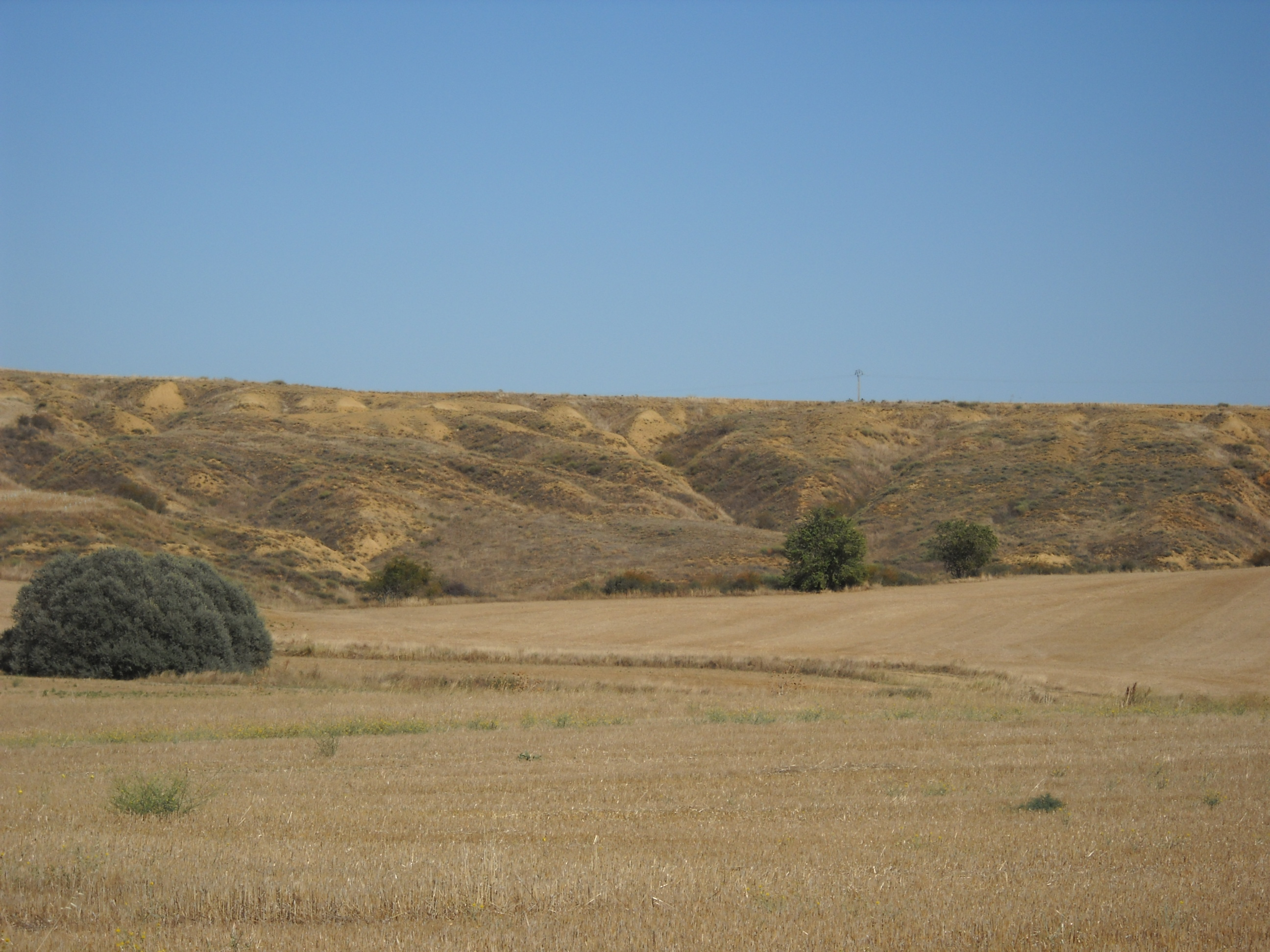 ayuntamiento de fontihoyuelo